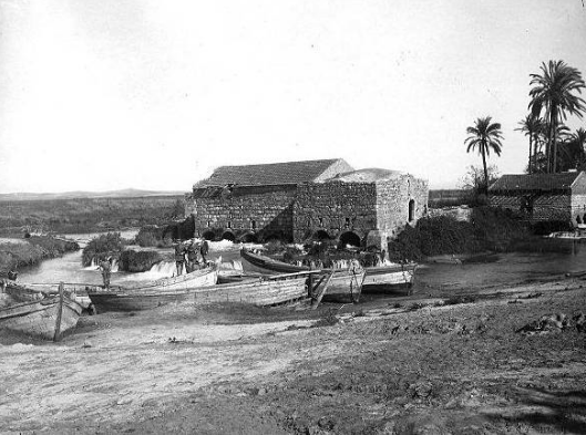 Jarisha